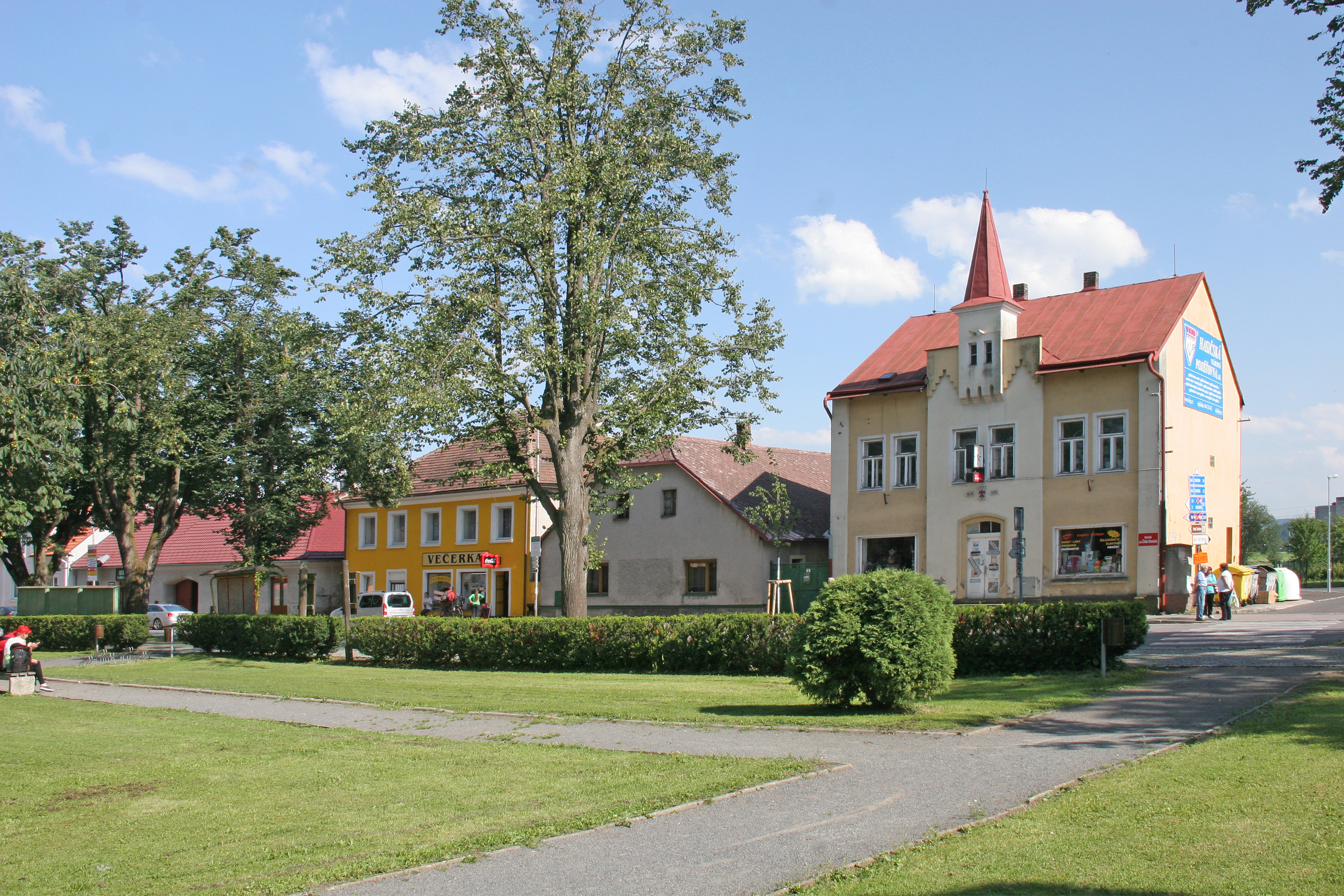 Seč čp 10